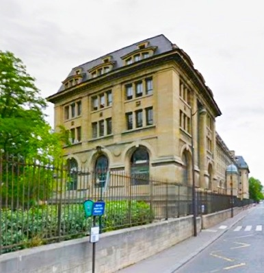 Galerie de Botanique du MNHN en 2013